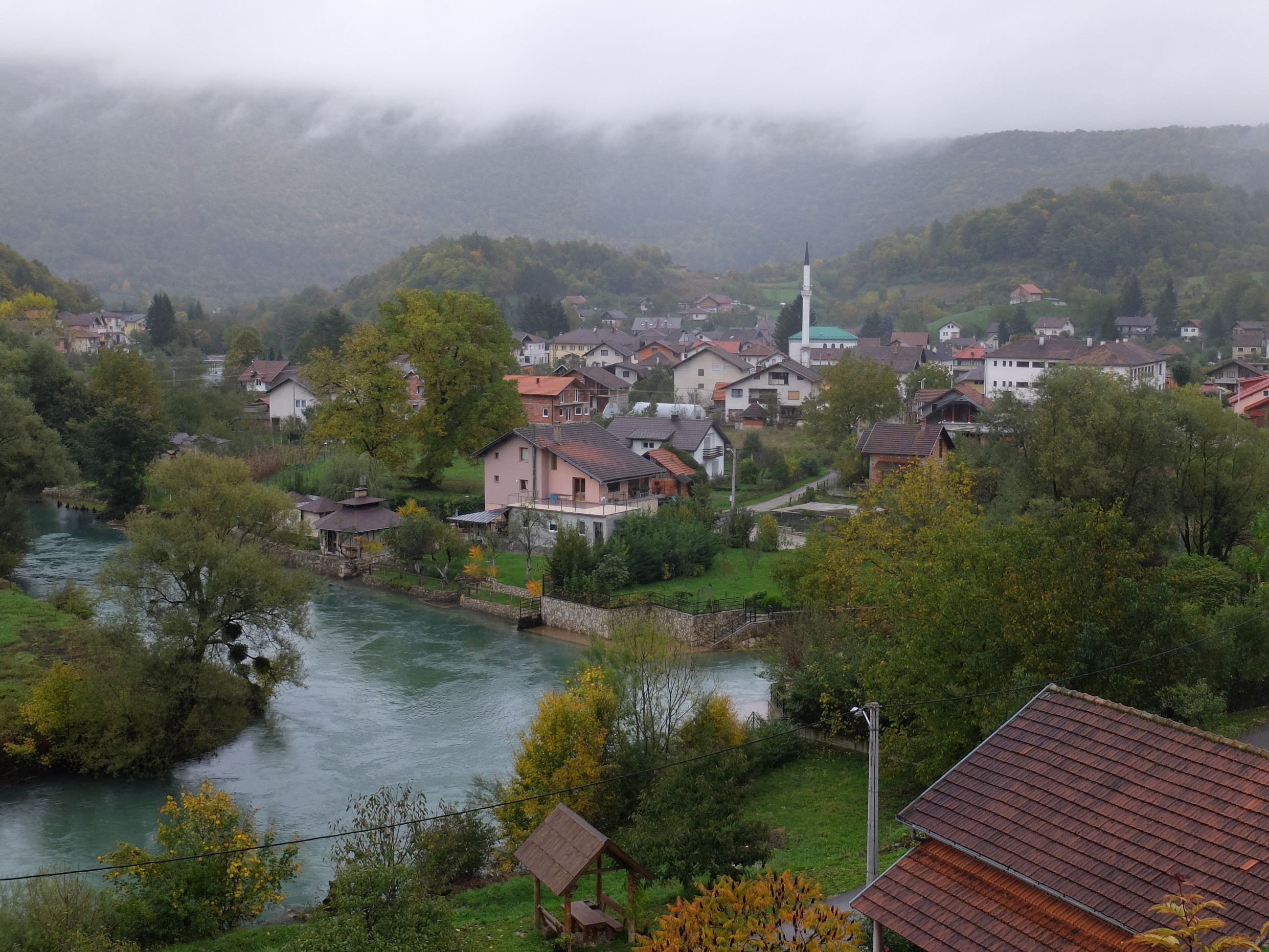 Ortsansicht